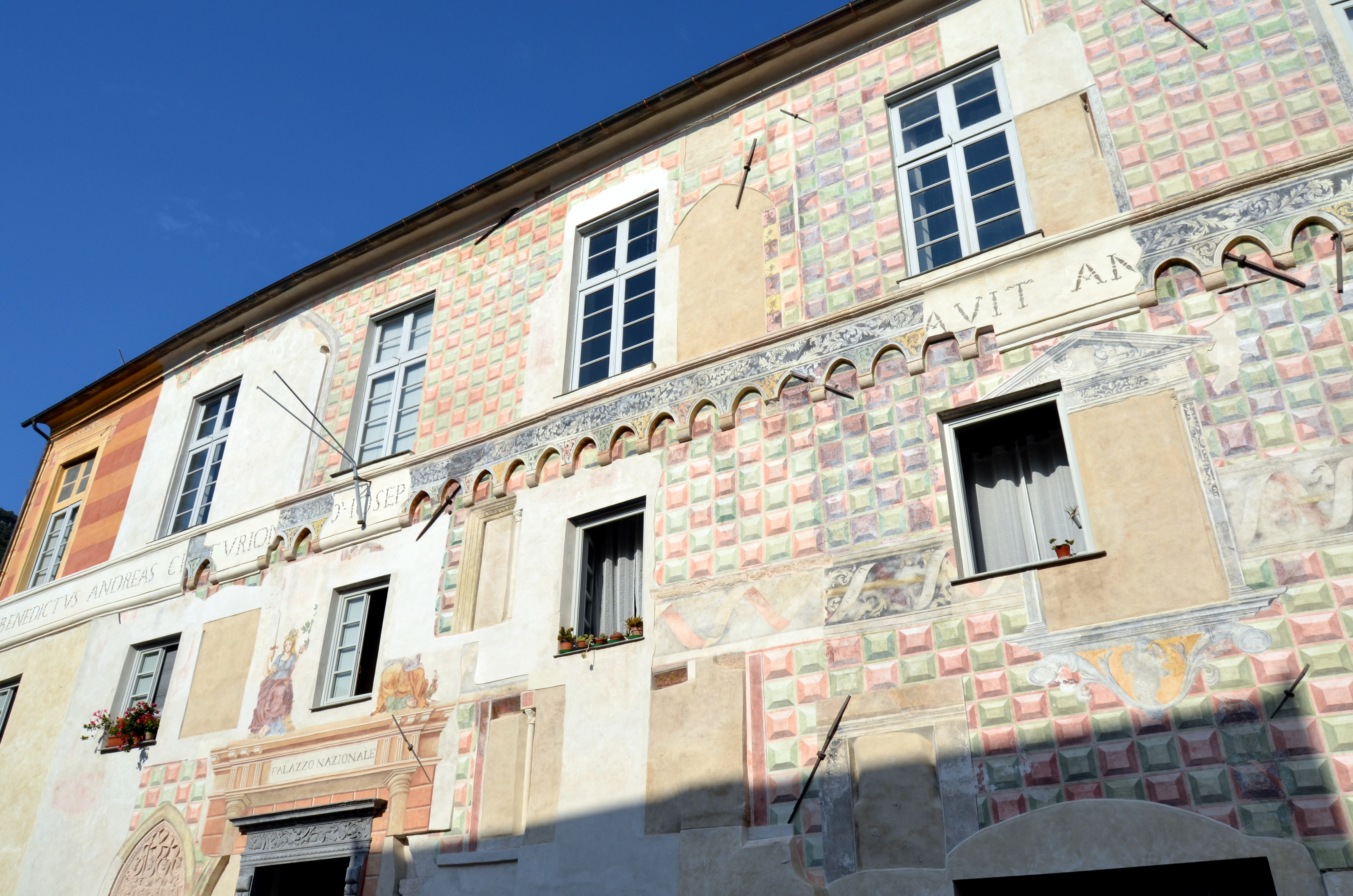 Il palazzo del Tribunale, Finalborgo, Finale Ligure, Liguria, Italia